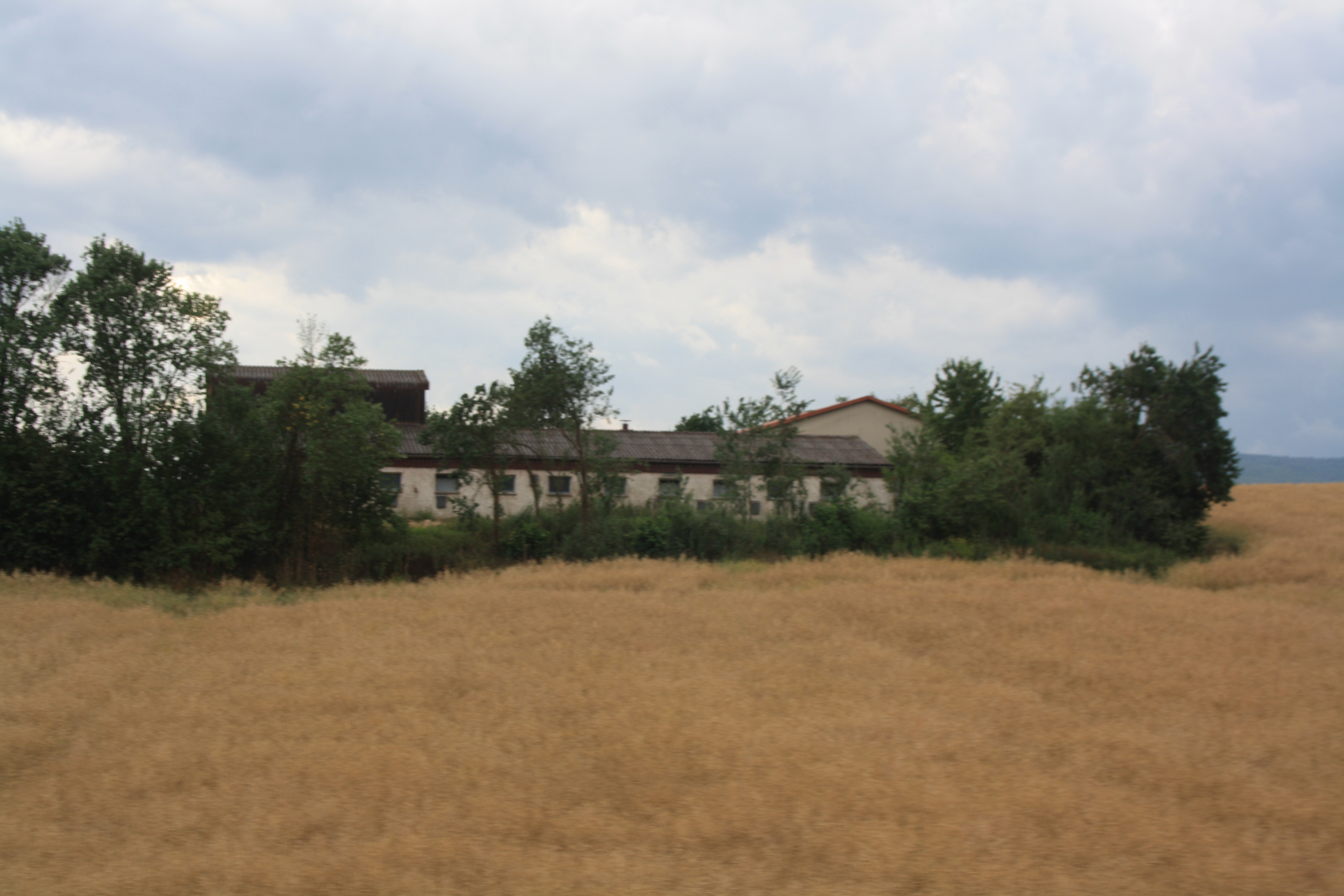 Typischer Aussiedlerhof irgendwo in Unterfranken